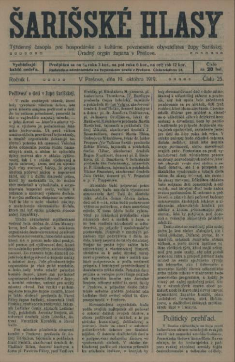 Titulný list týždenníka Šarišské hlasy.